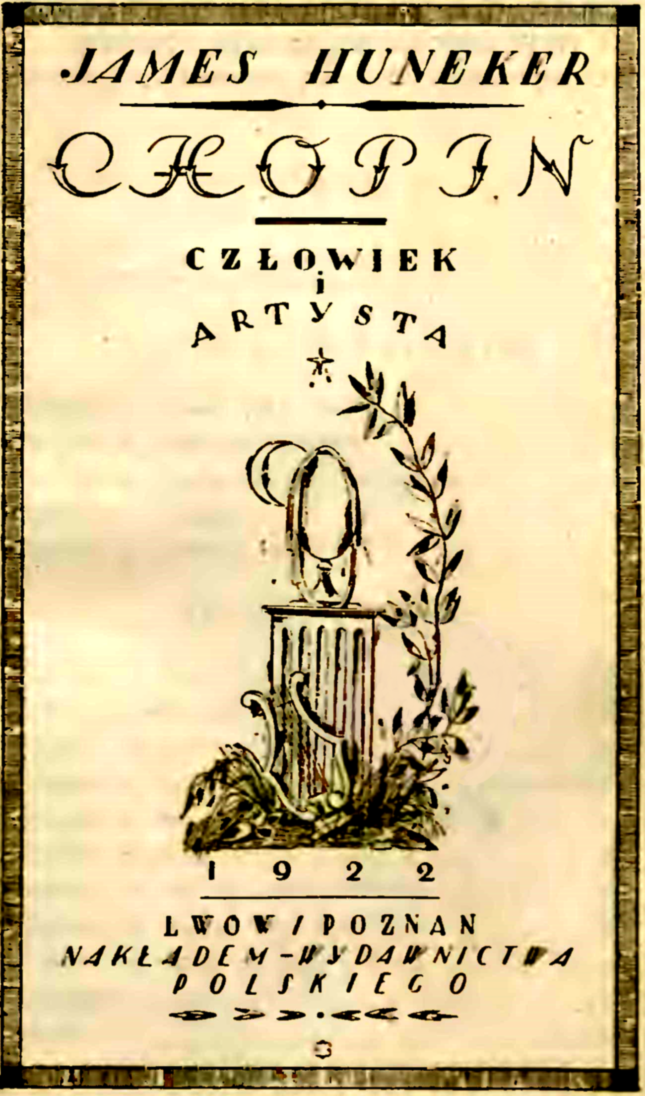 James Huneker: "Chopin Człowiek i Artysta", Wydawnictwo Polskie 1922; strona tytułowa